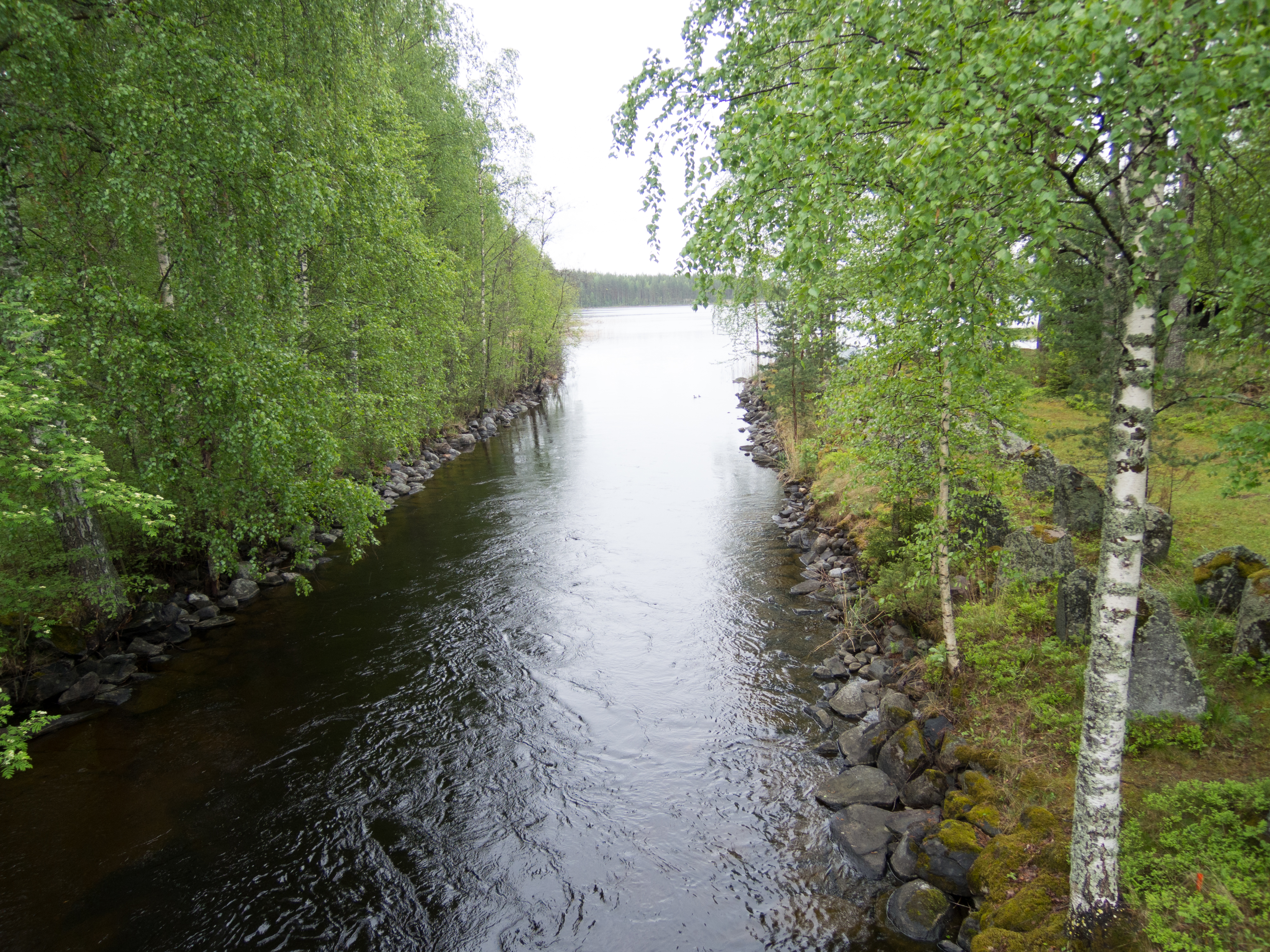 Raikuun kanava